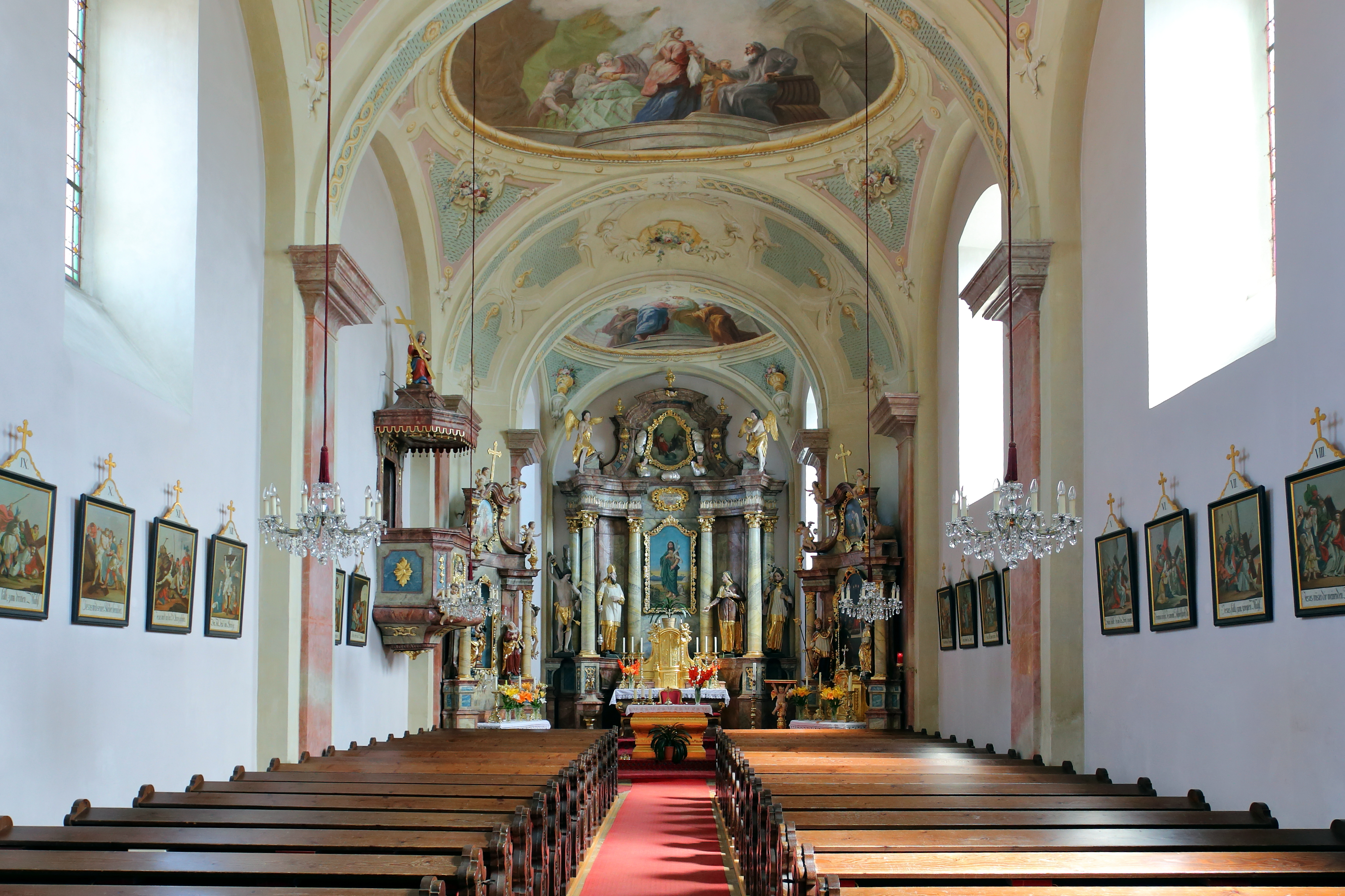 Innenansicht der katholischen Pfarrkirche hl. Johannes der Täufer in Blumau an der Wild, ein Ortsteil der niederösterreichischen Marktgemeinde Ludweis-Aigen. Eine spätbarocke Saalkirche mit einer Einrichtung aus dem 18. und 19. Jahrhundert.